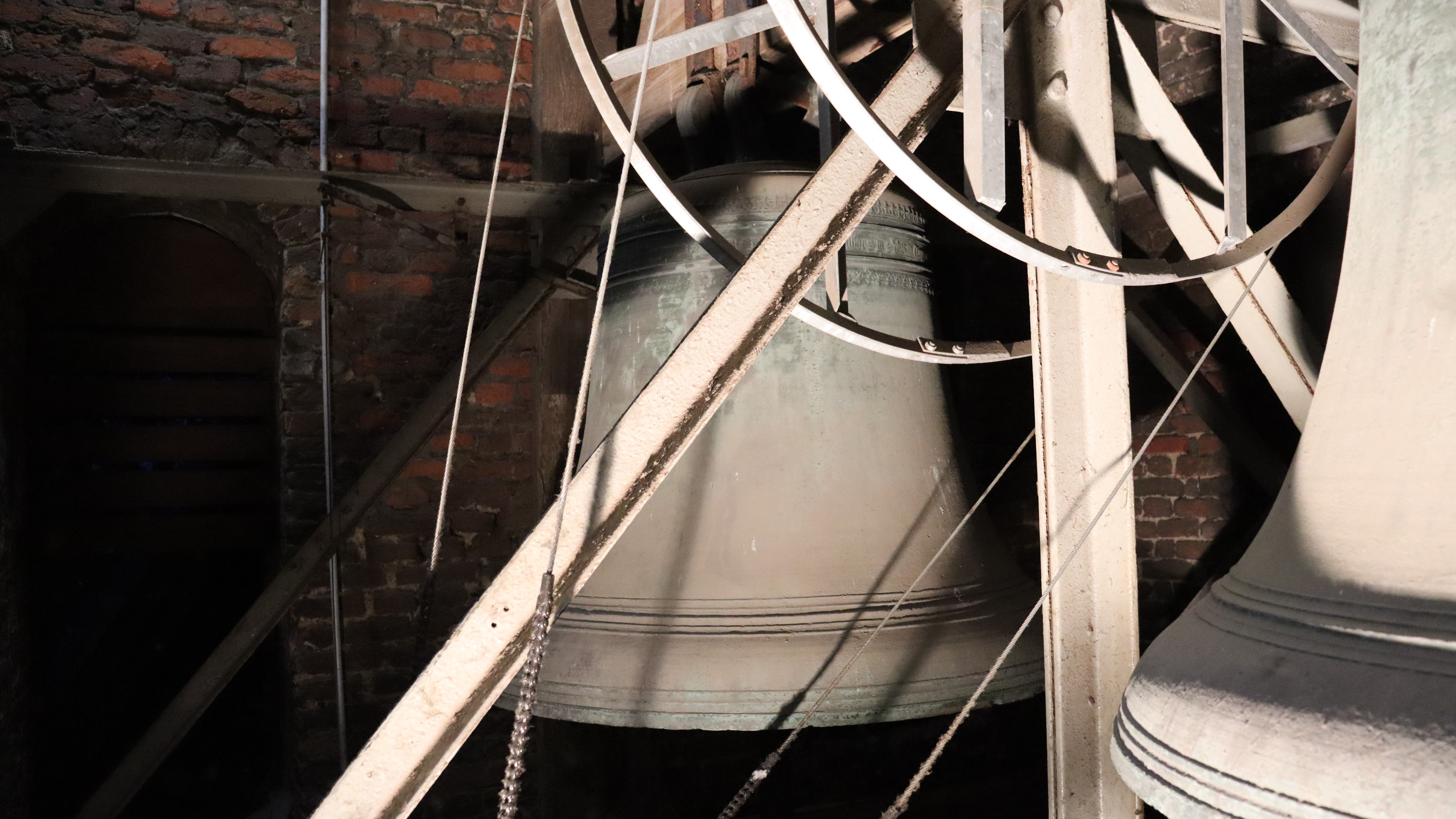 Die beiden großen Glocken der Dorfkirche. Die kleine Glocke befindet sich eine Etage höher im Turmdach.